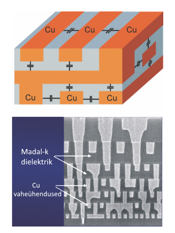 Cu vaheühendused ja madal-k dielektrik nende vahel. Cu liinide vahelist mahtuvust vähendades saab vähendada aega signaali transpordiks transistoride vahel.